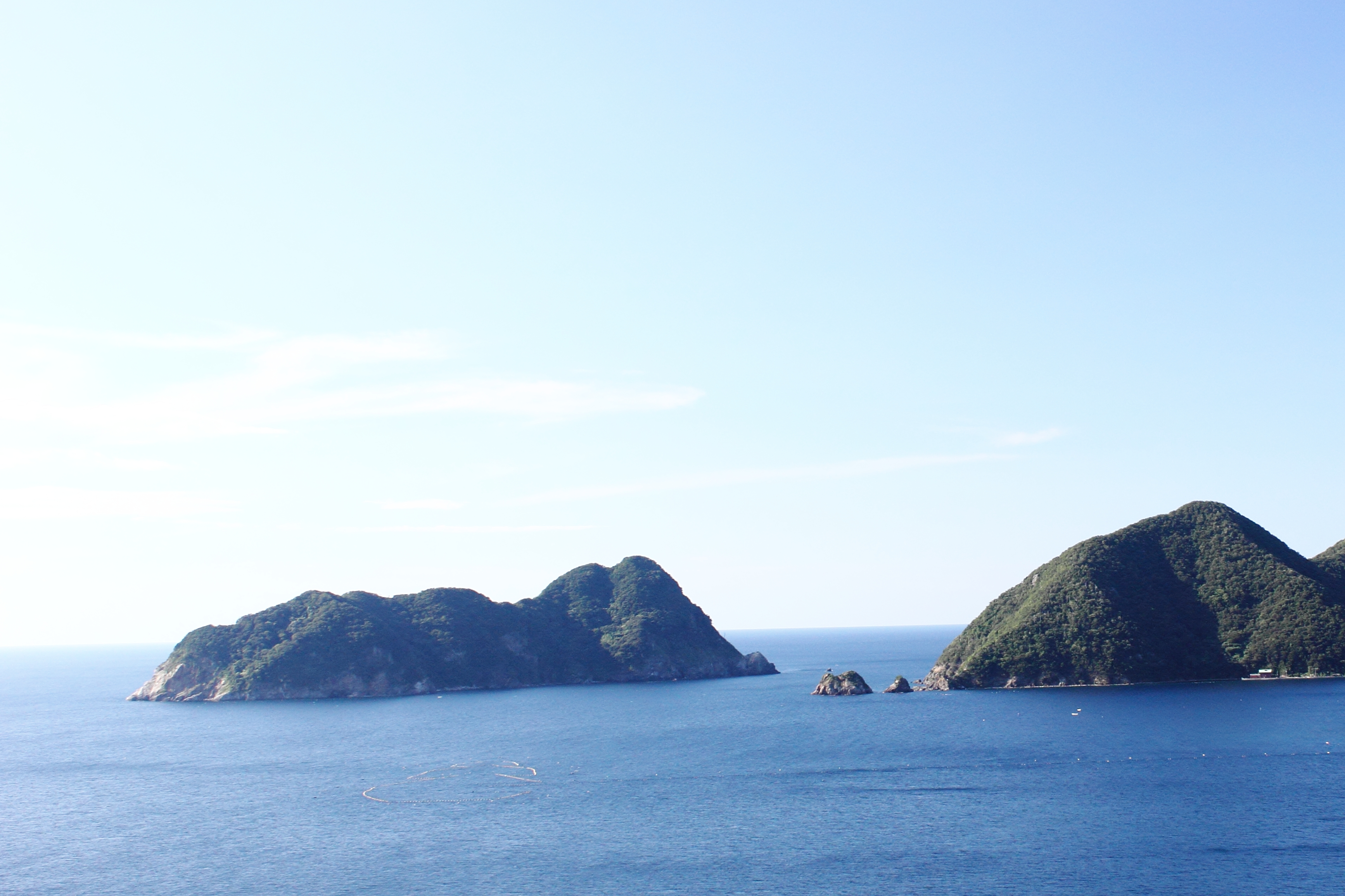 常神半島先にある御神島